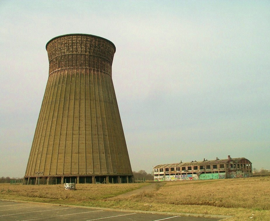 Tour aéroréfrigérante de la SMN à Colombelles (Calvados)